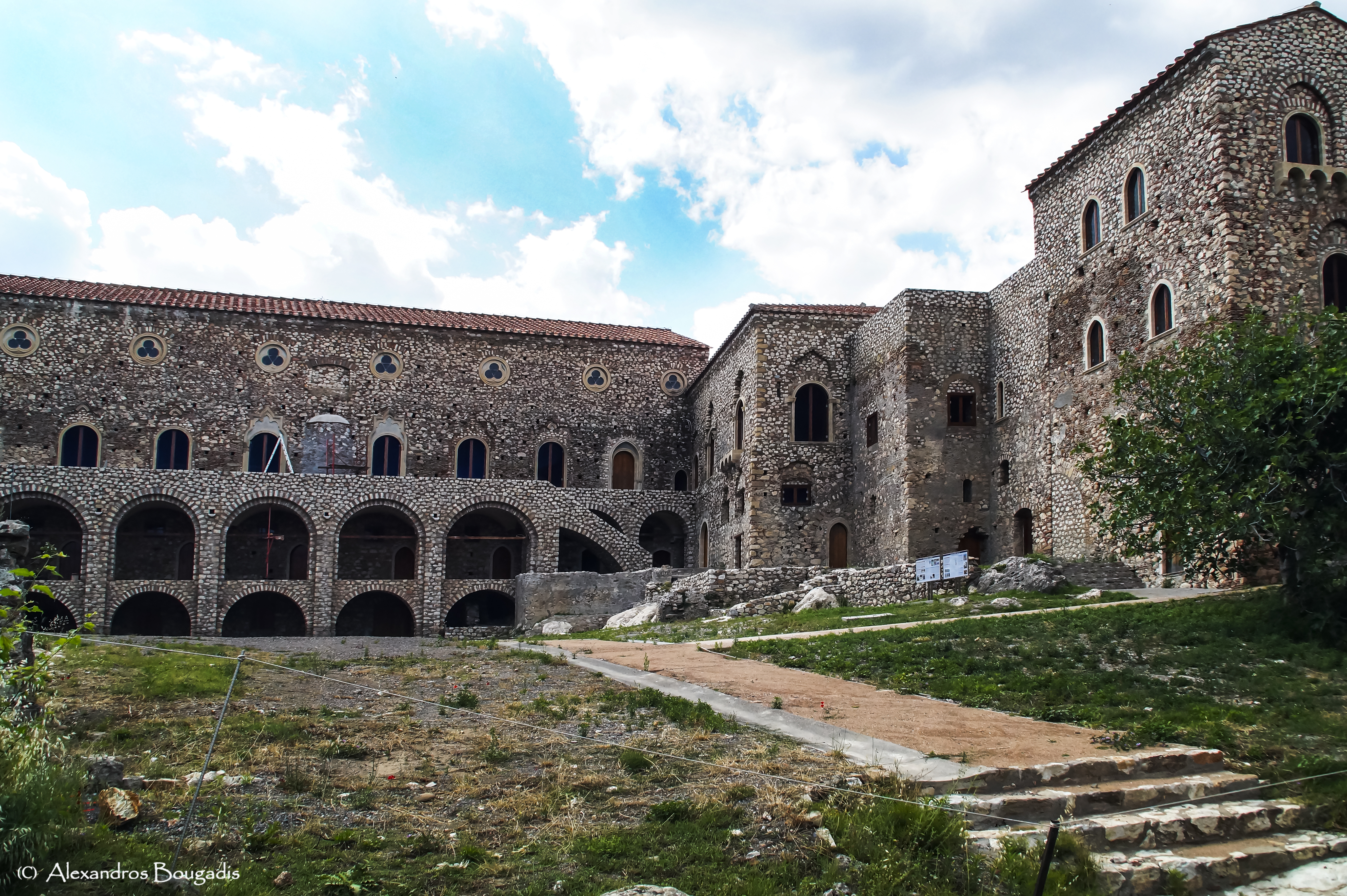 Αρχαιολογικός Χώρος του Μυστρά«άγνωστο»